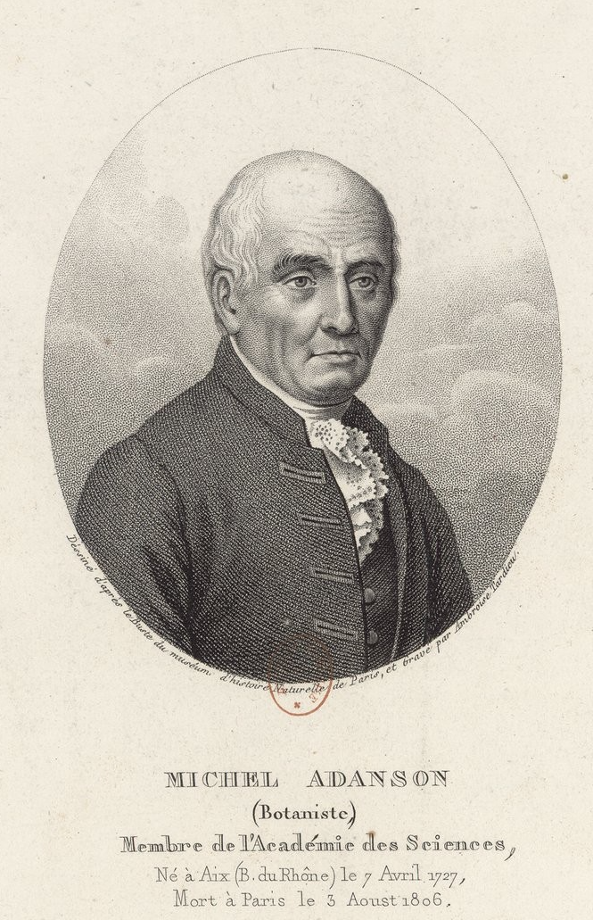 Michel Adanson (1727-1806)